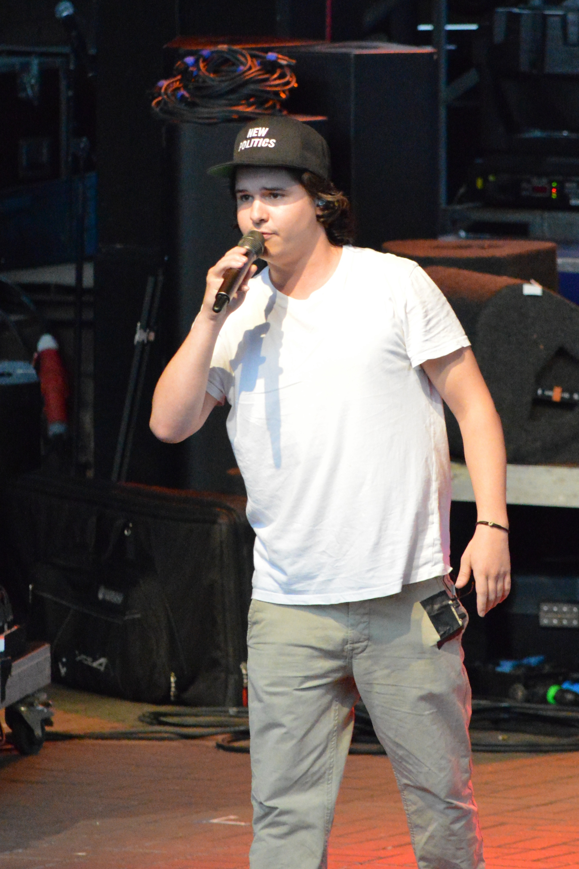 Lukas Graham Forchhammer, Sänger der Band Lukas Graham, beim Traumzeit-Festival 2013